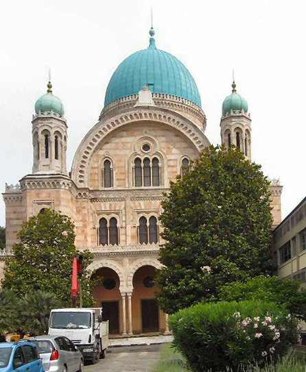 Il Tempio israelitico di Firenze.